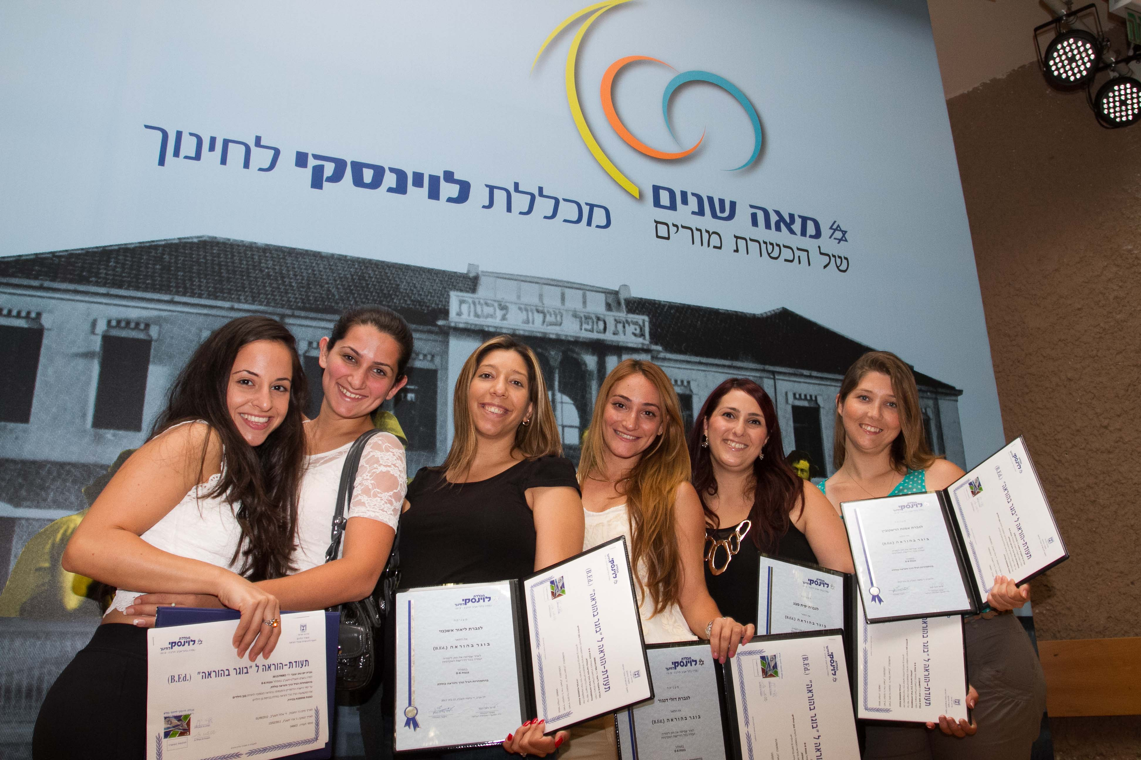 סטודנטיות בוגרות מכללת לוינסקי בטקס סיום תואר ראשון